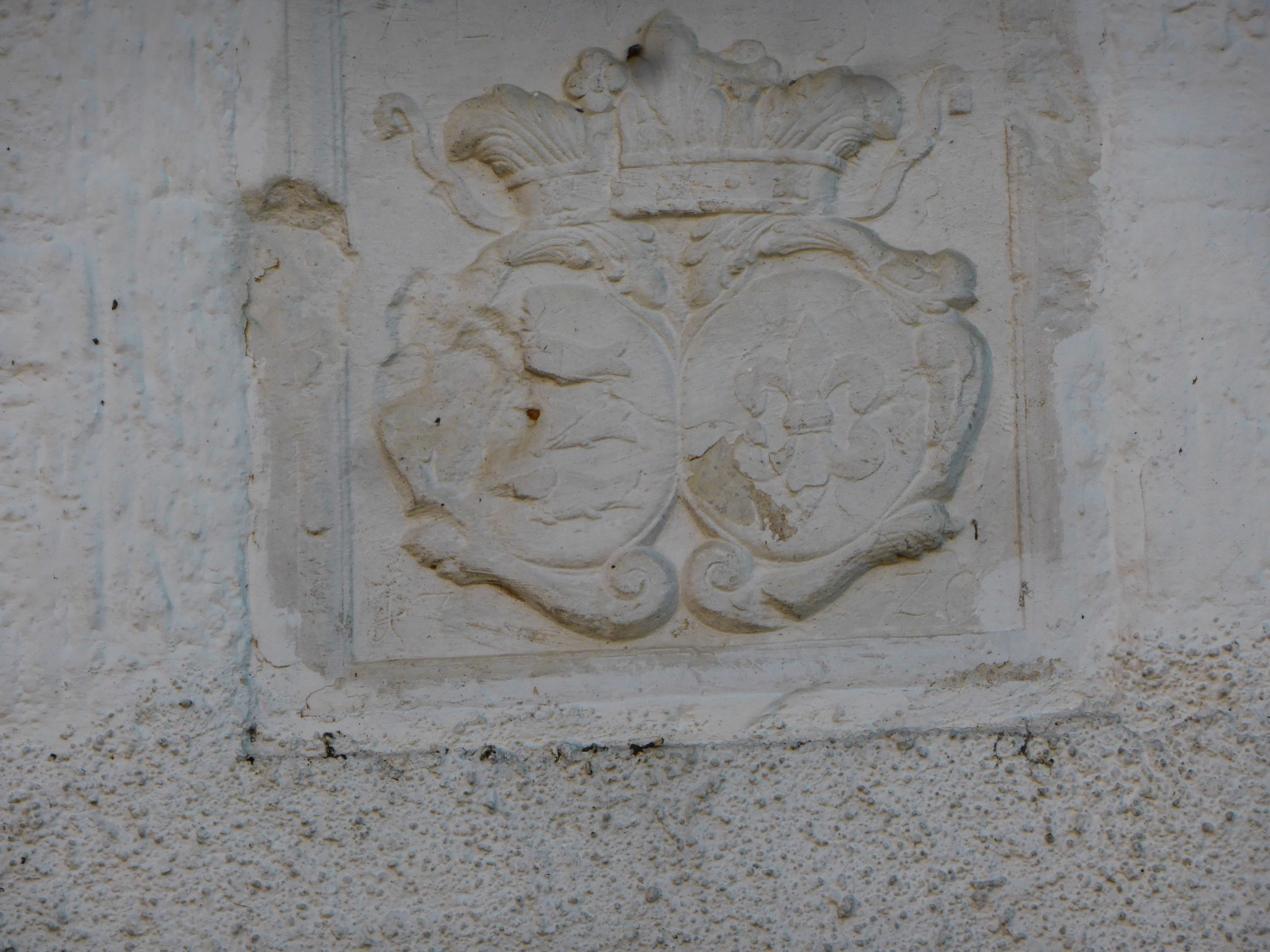 Hammerstraße 20 - Wappenstein (Schmidmühlen).jpg